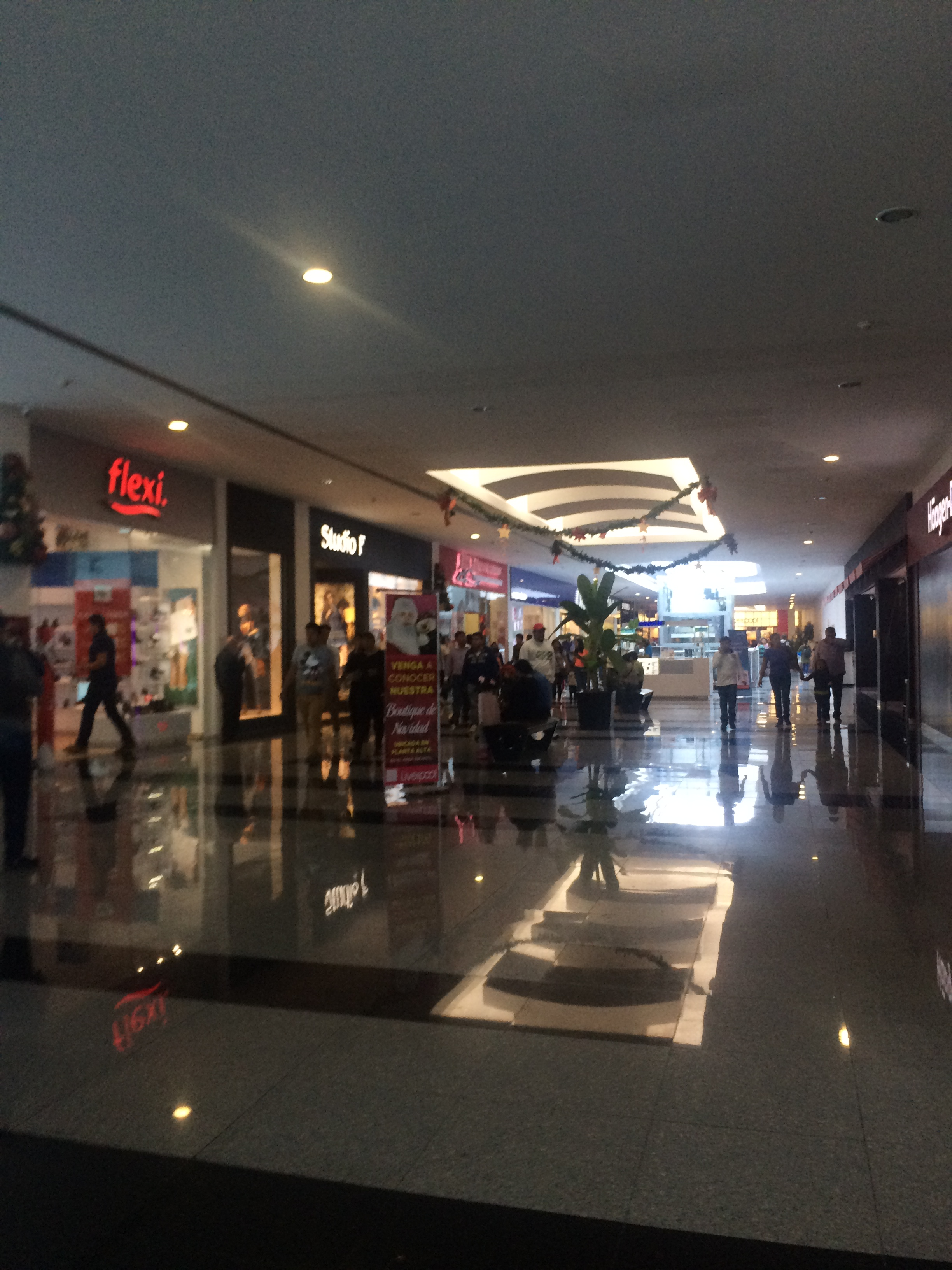 Locales comerciales de Plaza Galerias